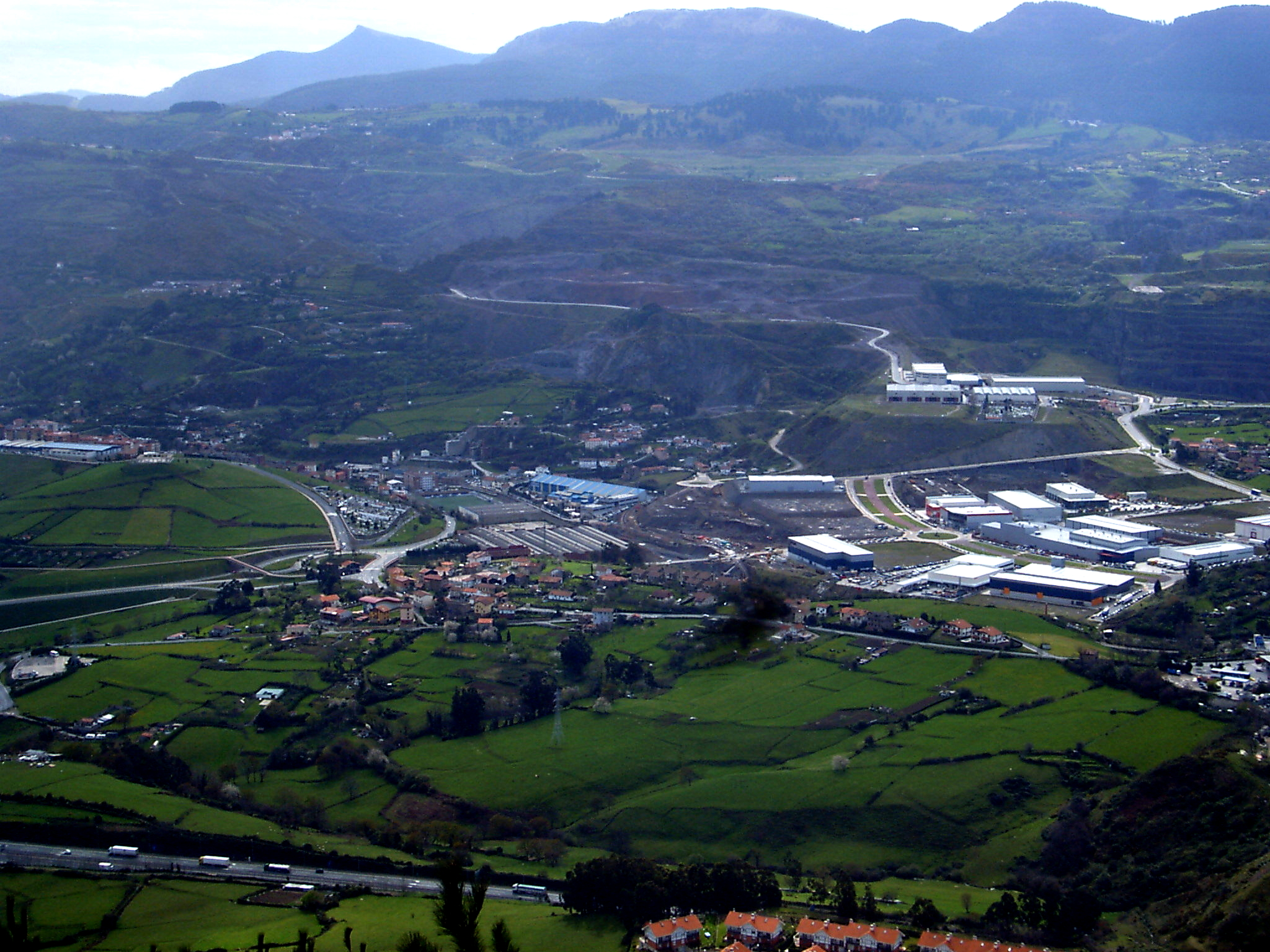 Ortuella